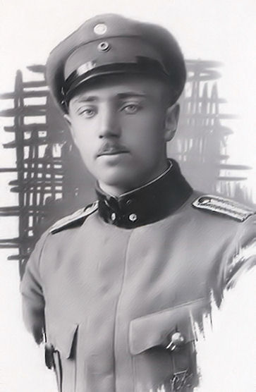 Hans Edvard Holopainen